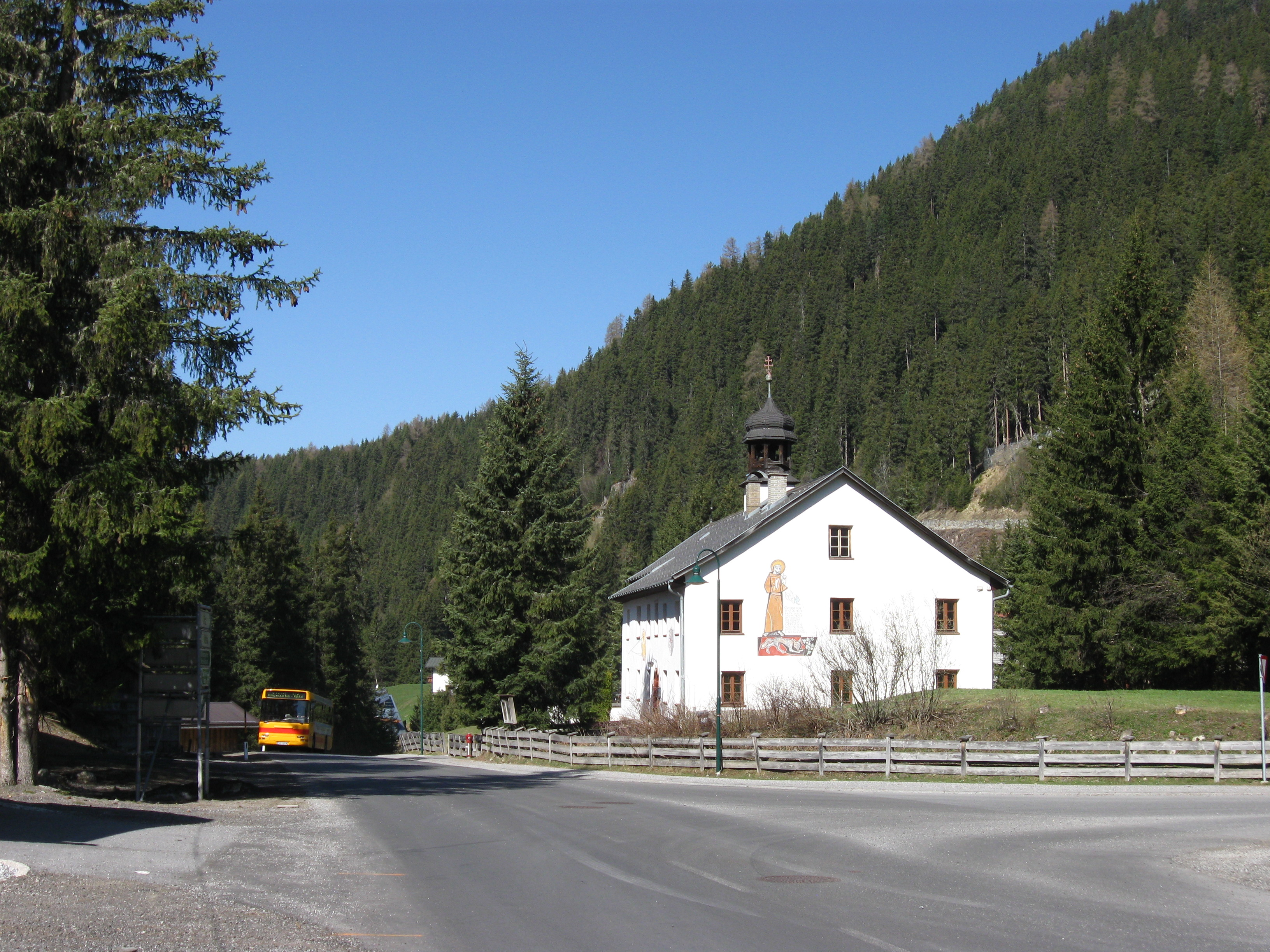 Die Kirche des Haiminger Ortsteils Ochsengarten